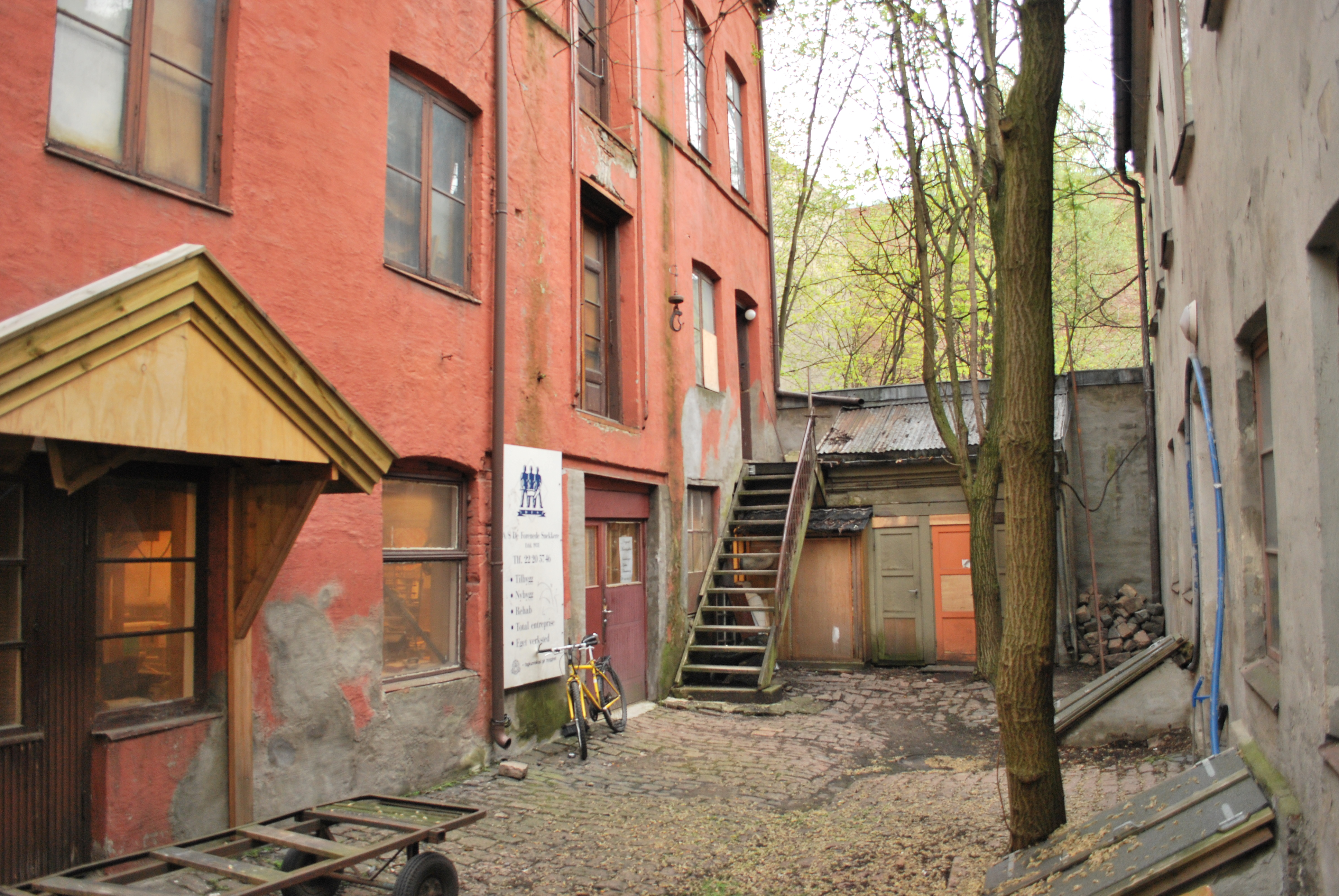 Gårdsrom med bakbygning fra 1862, i dag snekkerbedrift, Torggata 23, Oslo